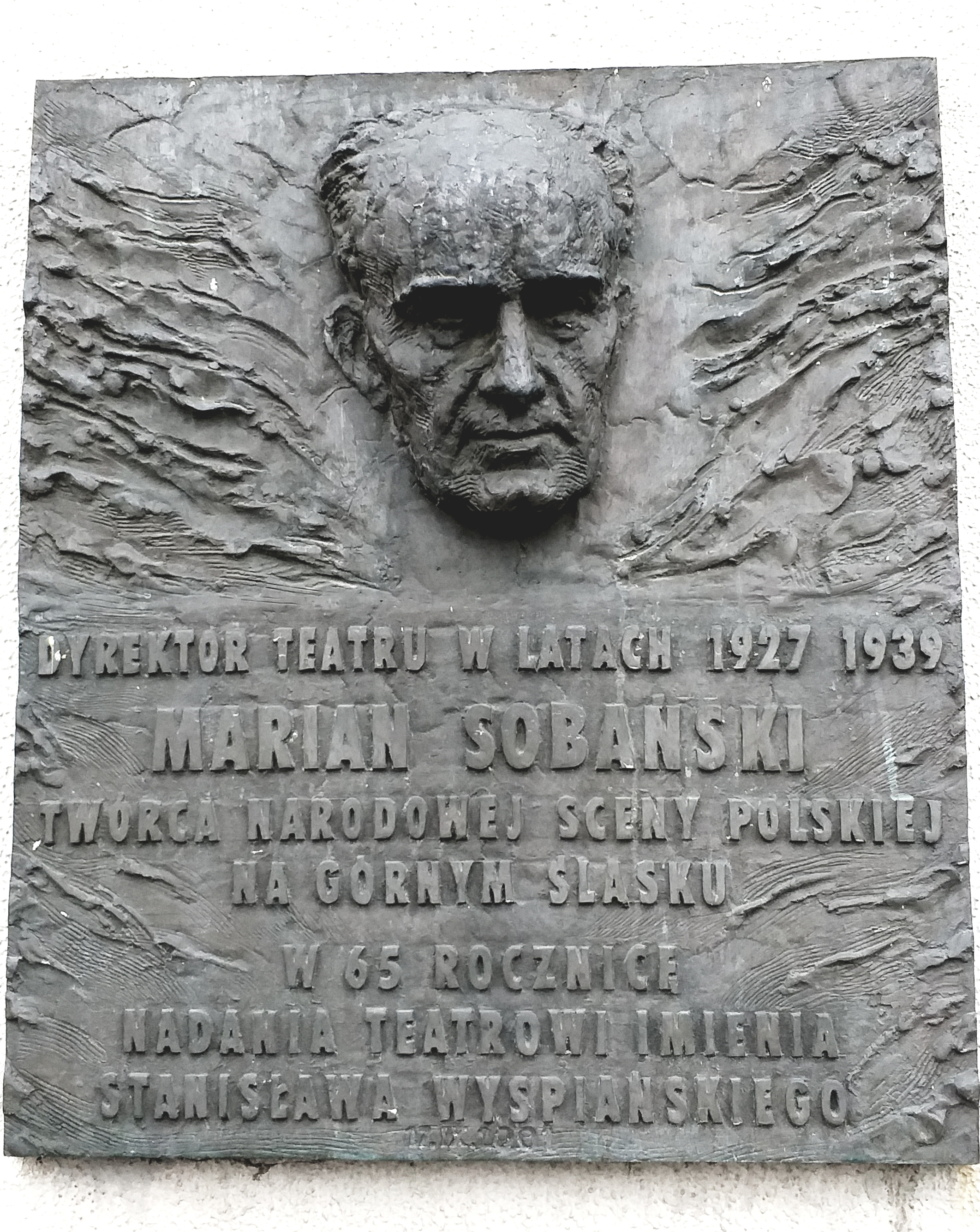 Marian Sobański - tablica pamiątkowa wmurowana w gmach Teatru Śląskiego im. Stanisława Wyspiańskiego w Katowicach